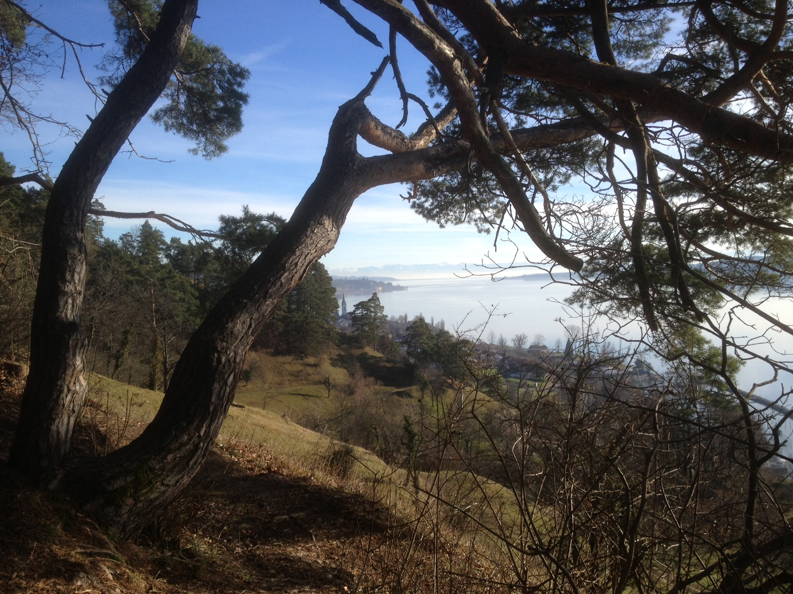 Deutschland - Baden-Württemberg - Bodenseekreis - Sipplingen: Naturschutzgebiet "Köstenerberg", Blick über Sipplingen zum Bodensee